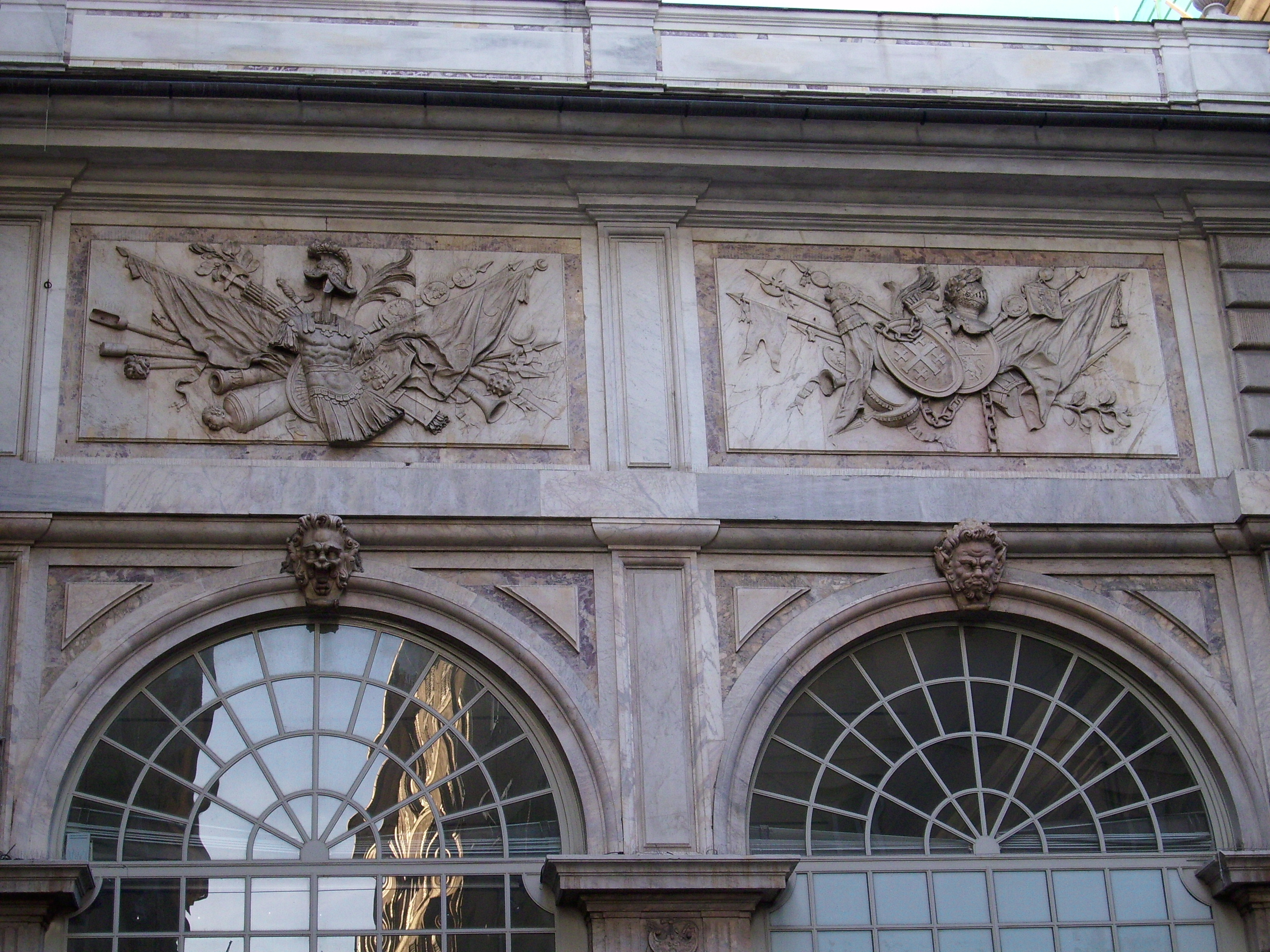 Loggia dei mercanti a Genova, particolari